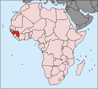 Karte Afrikas, Guinea hervorgehoben.